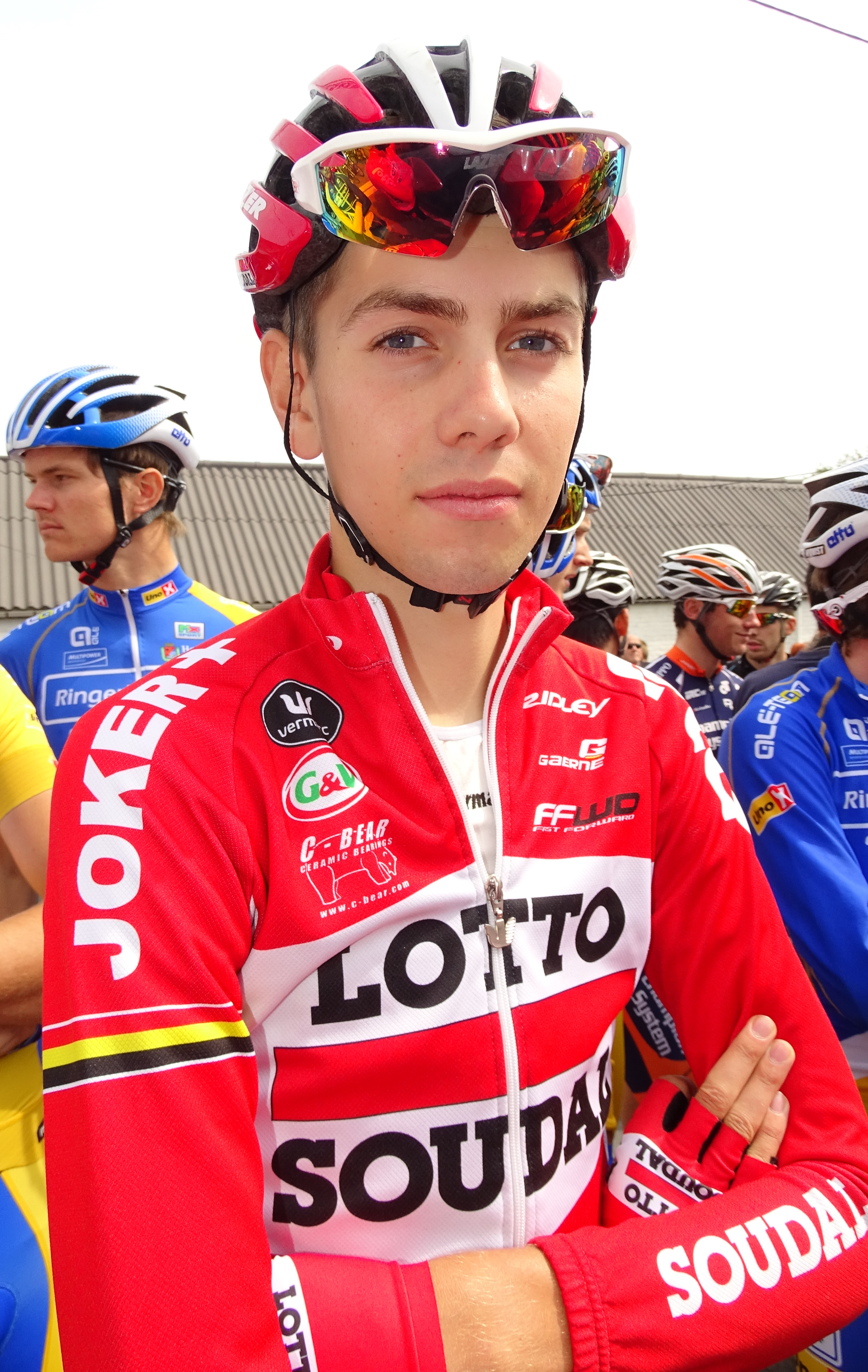 Reportage réalisé le mardi 25 août à l'occasion du départ et de l'arrivée du Grand Prix des Marbriers 2015 à Bellignies, Nord-Pas-de-Calais, France.